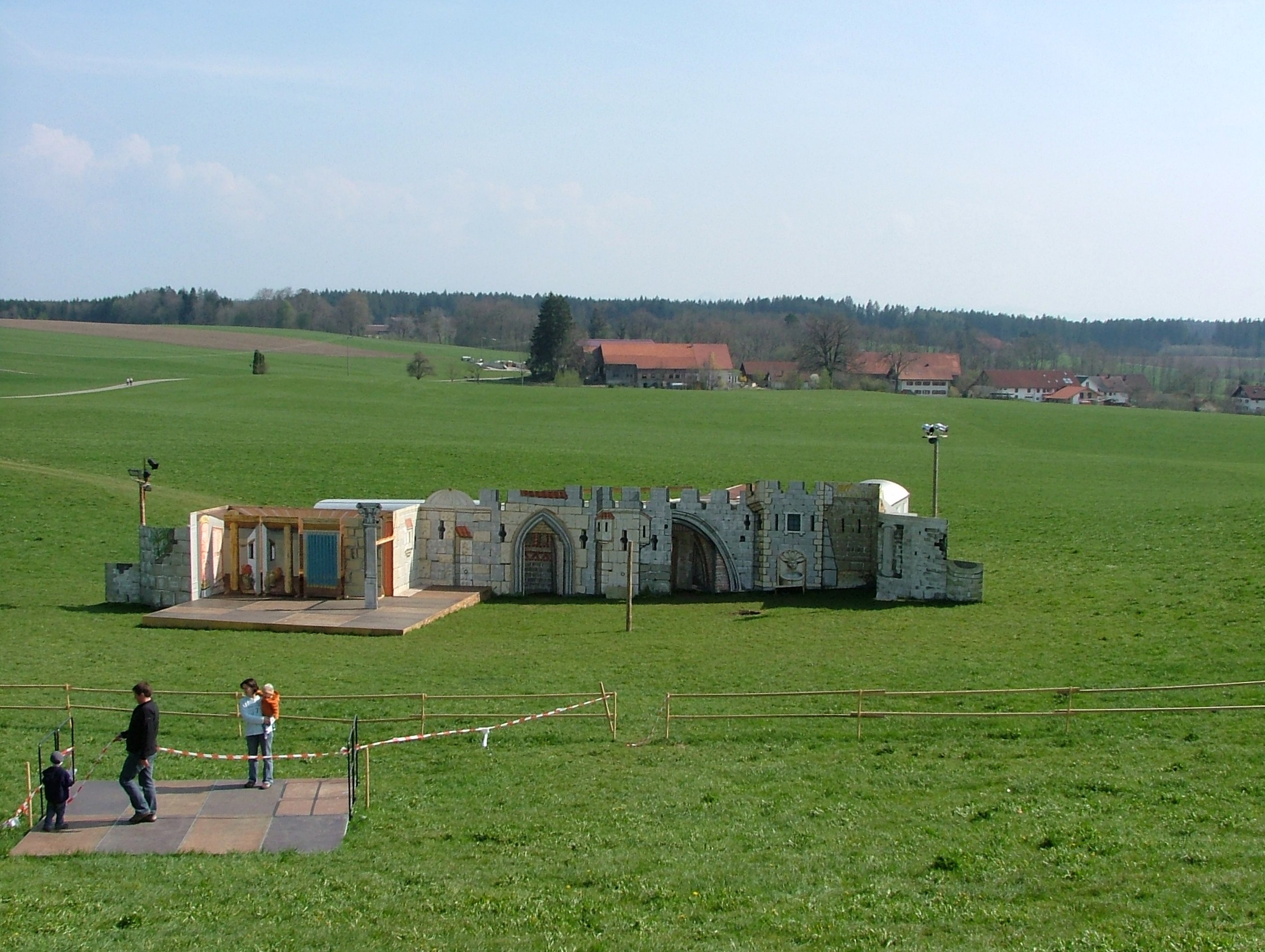 Passionsspiele in La Salette Engeratshofen